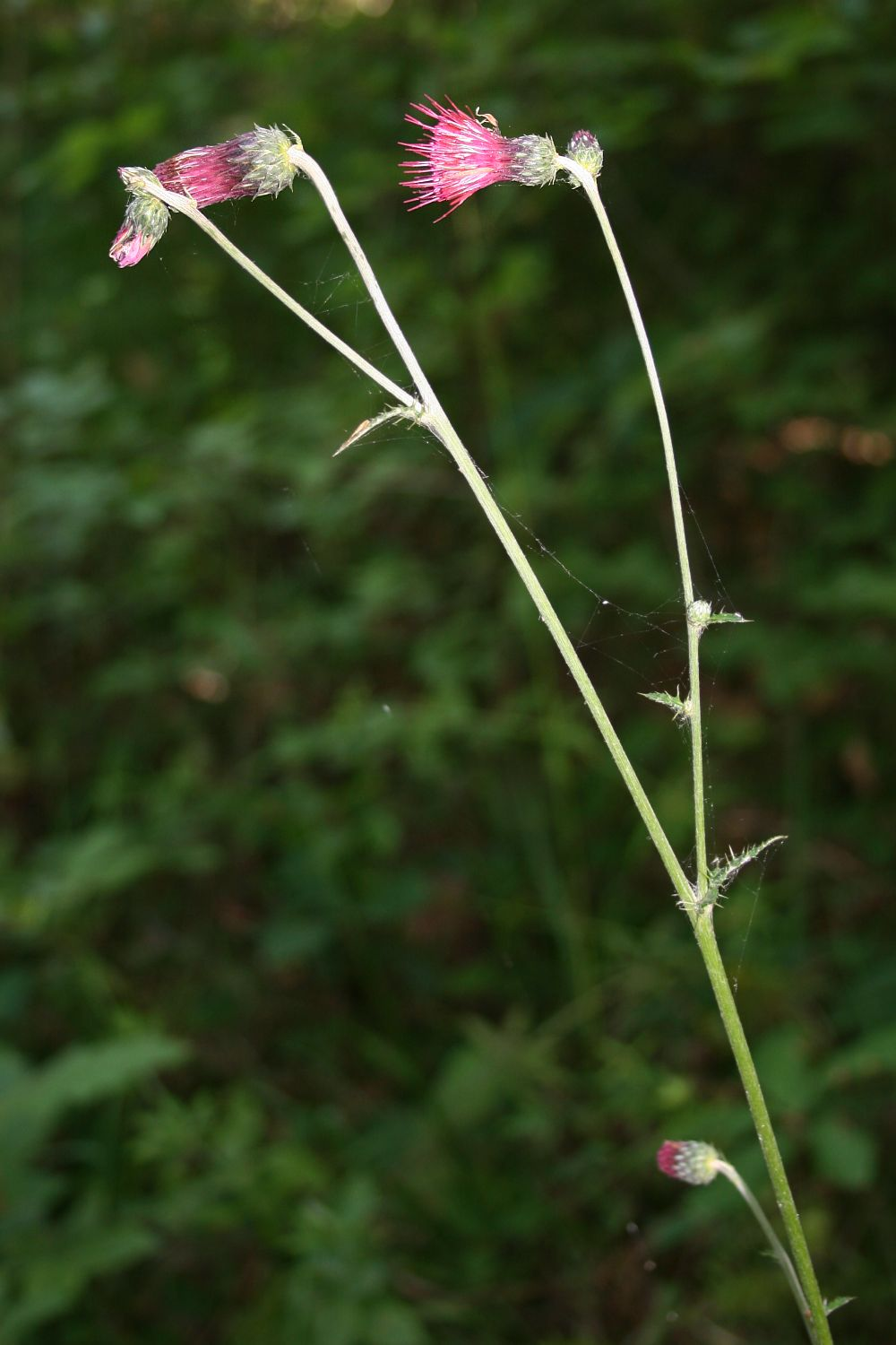 Cirsium hypoleucum, Korbblütler (Asteraceae) - Türkei/Türkiye/Turkey: Düzce Prov./Düzce ili, NW Kalkın W Akçakoca, Eichen-Mischwald